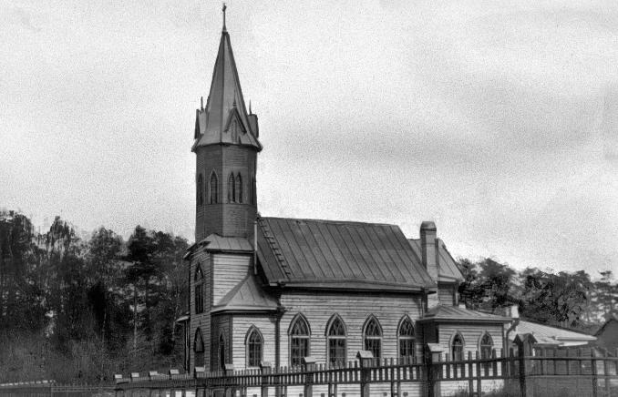 Не сохранилась